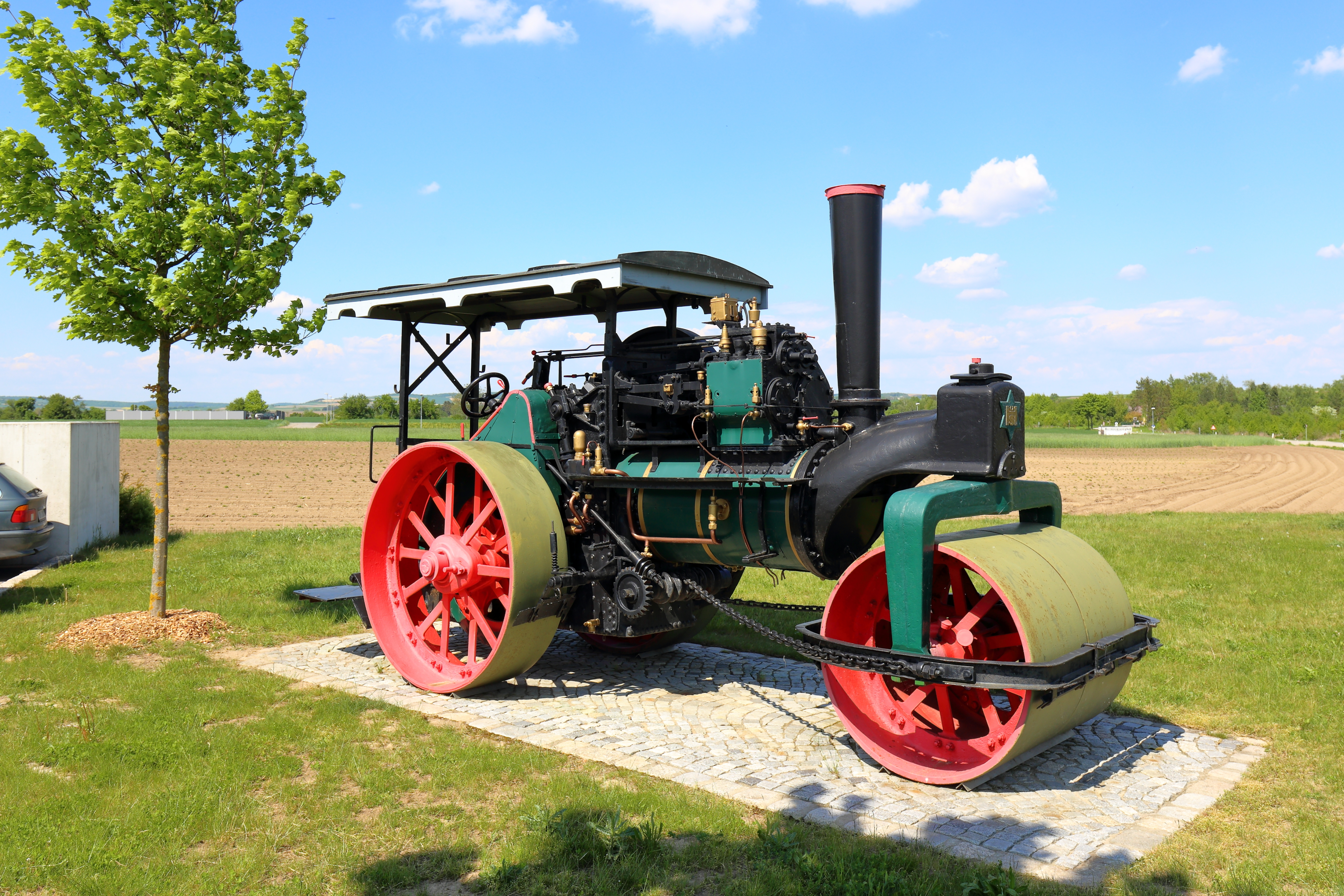 Die Henschel & Sohn Straßenwalze mit der Fab.-Nr. 1026 (Bj. 1928) steht als Denkmal beim Parkplatz der Straßenmeisterei Sierndorf in der niederösterreichischen Marktgemeinde Sierndorf.